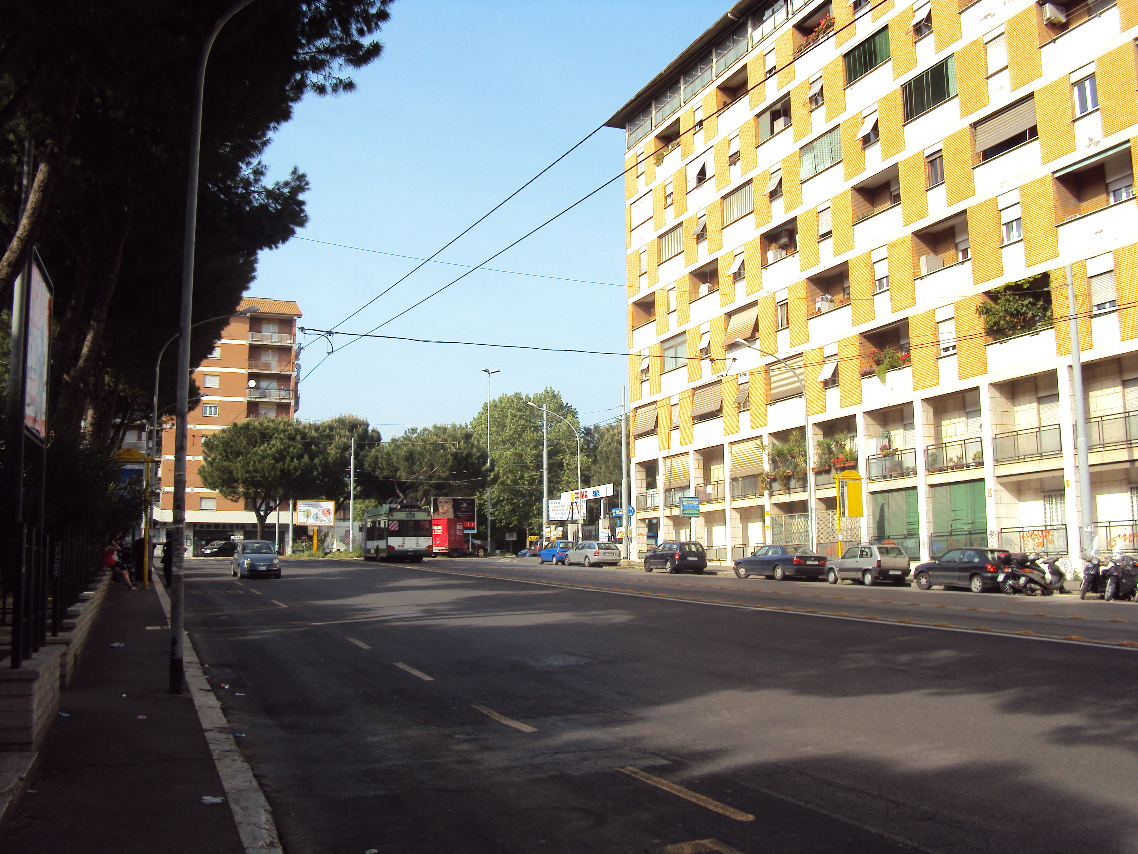 Piazza Ottaviano Vimercati, Roma